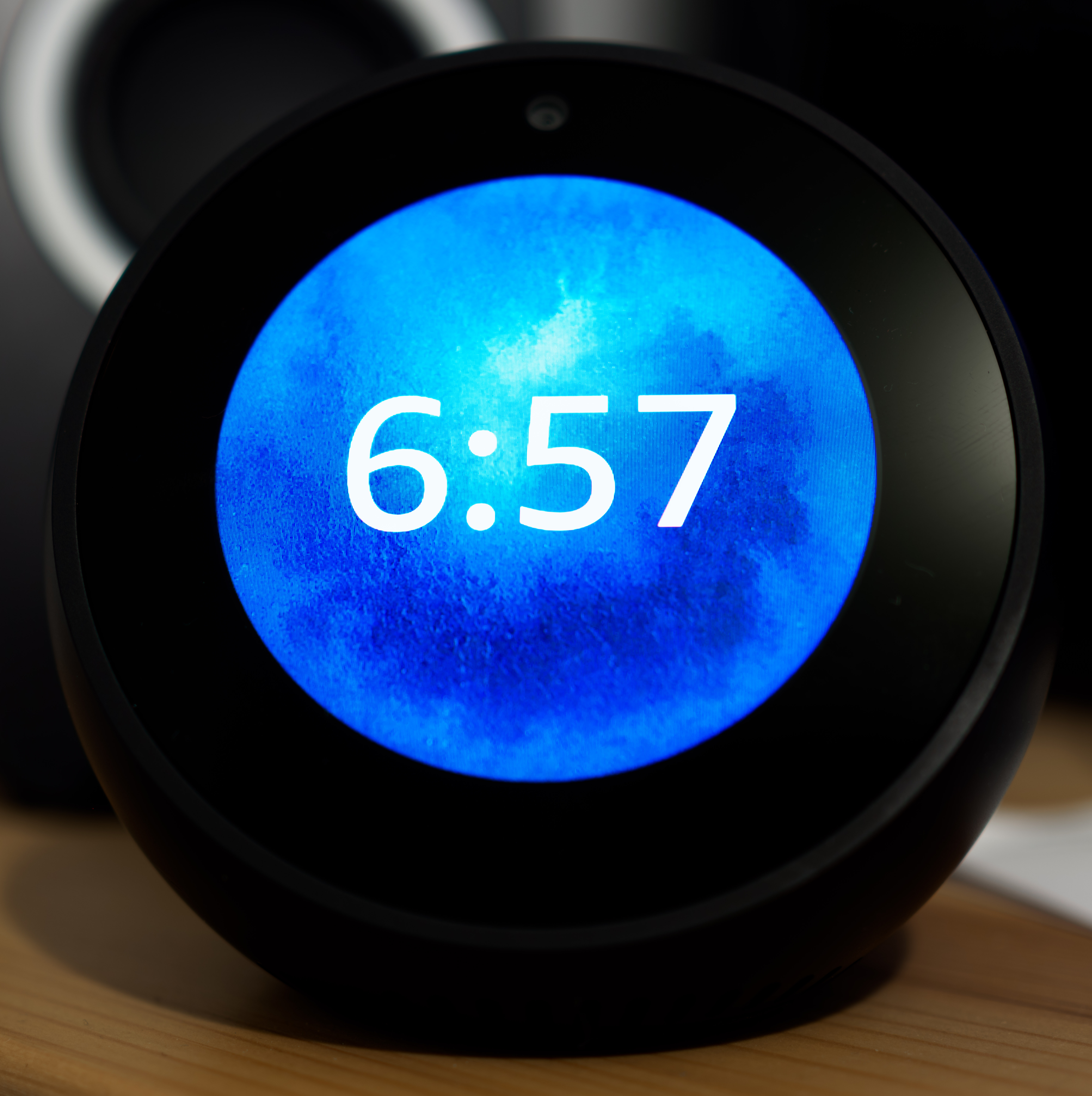 amazon echo spot uk model